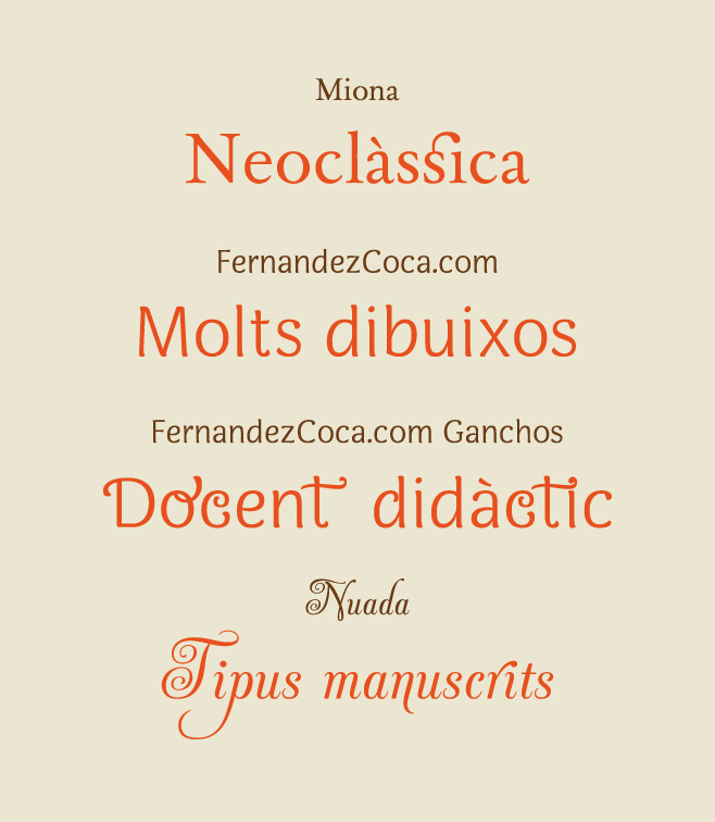 Mostra lletres tipogràfiques Miona, , Ganchos, Nuada